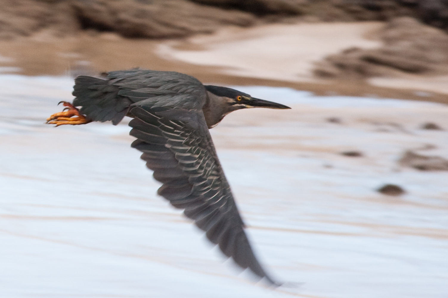 Lava Heron Butorides sundevalli, Galápagos Islands